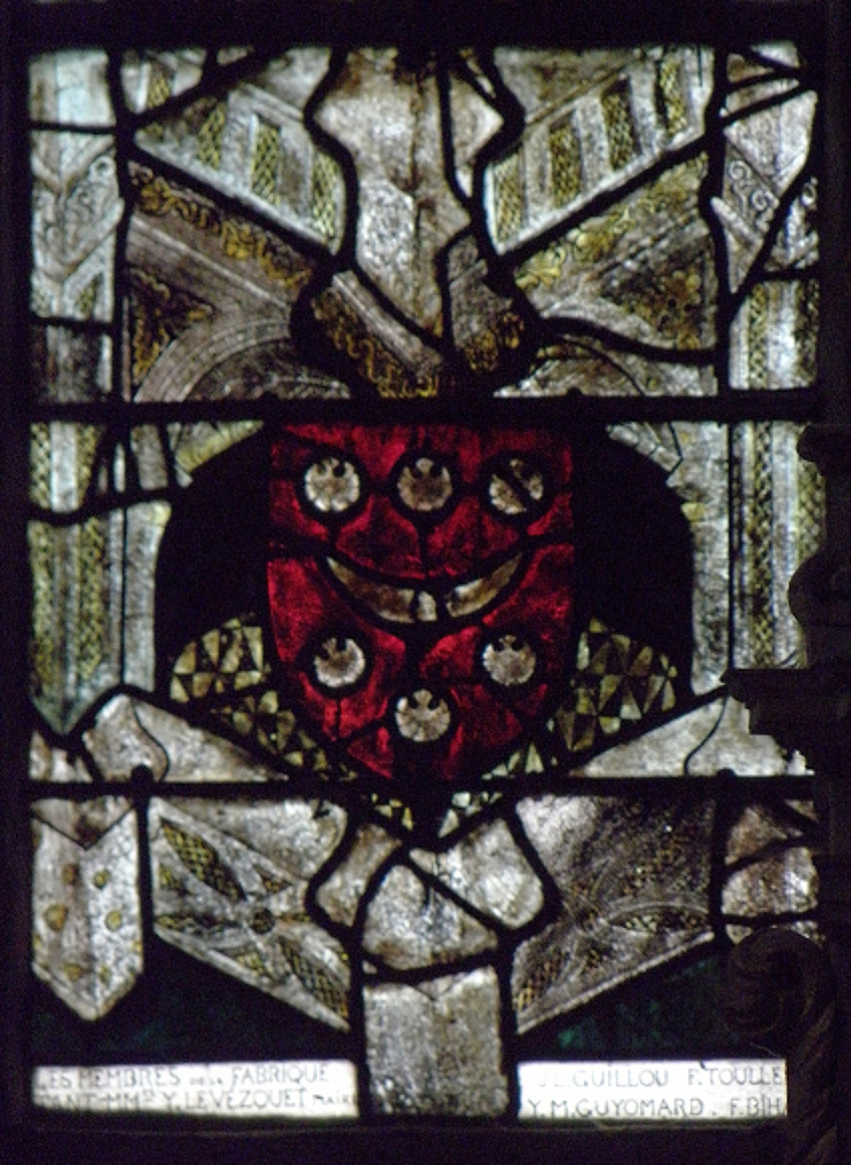 Armes des Le Goalès. Maîtresse-vitre de l'église Notre-Dame de Runan (22).